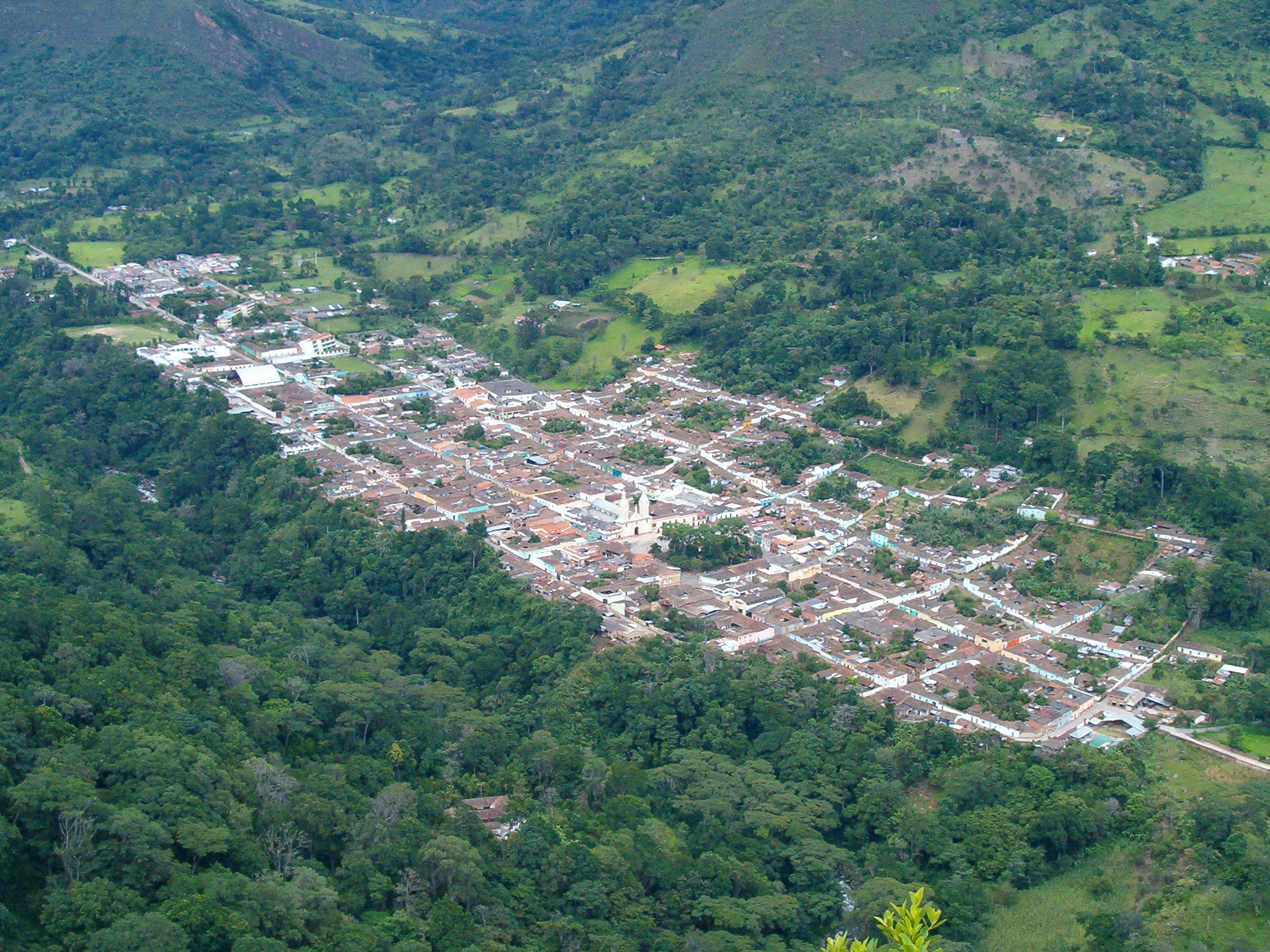 Panorámica del Poblado del San Andrés, Santander, casco urbano.